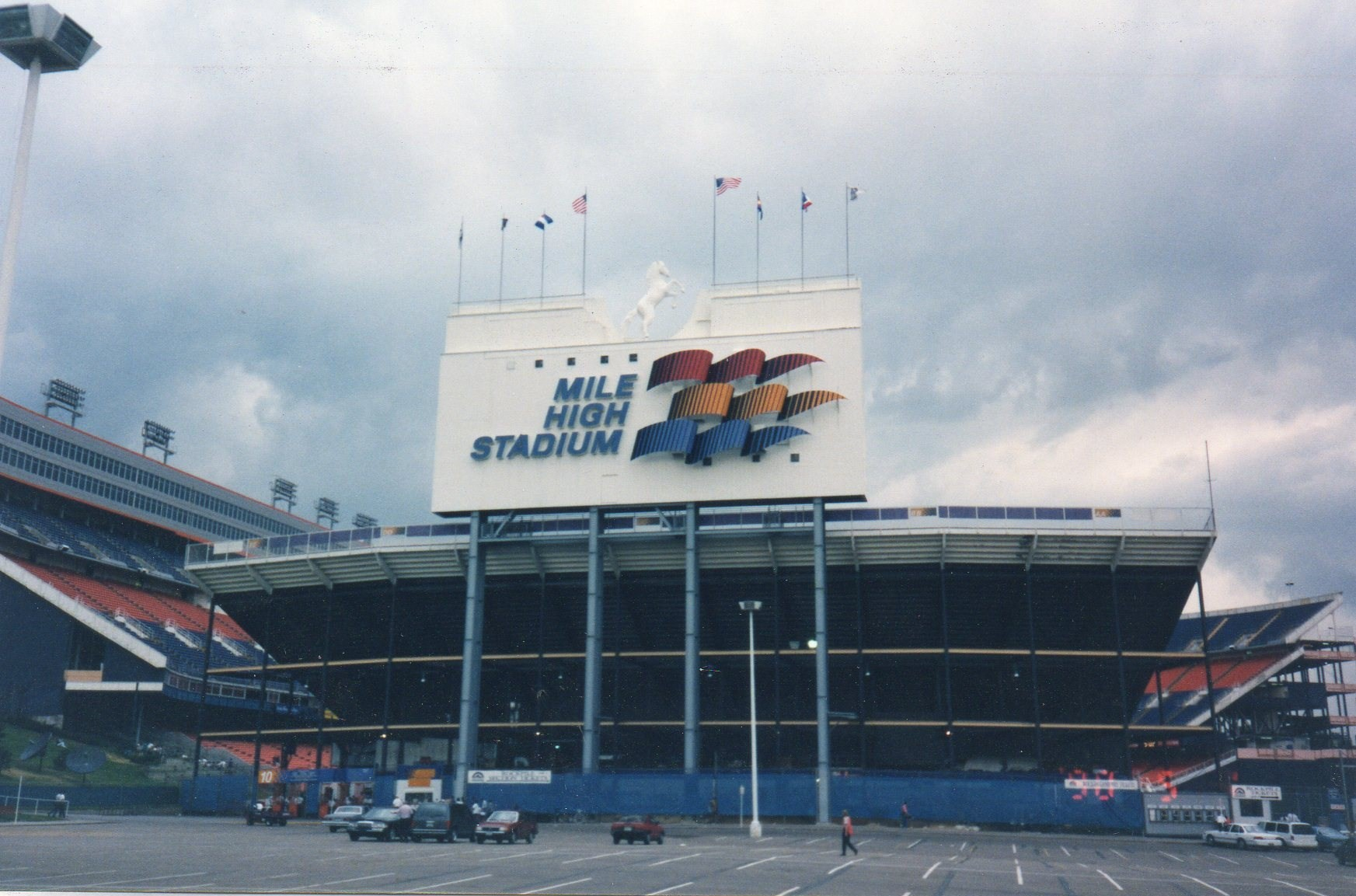 Denver, CO 1994